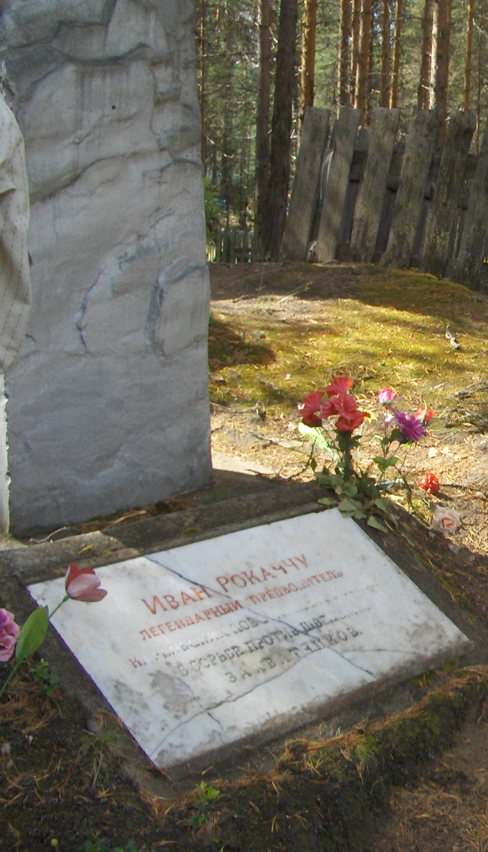 Ivan Rokaččun muistomerkki Tiiksassa Karjalassa.